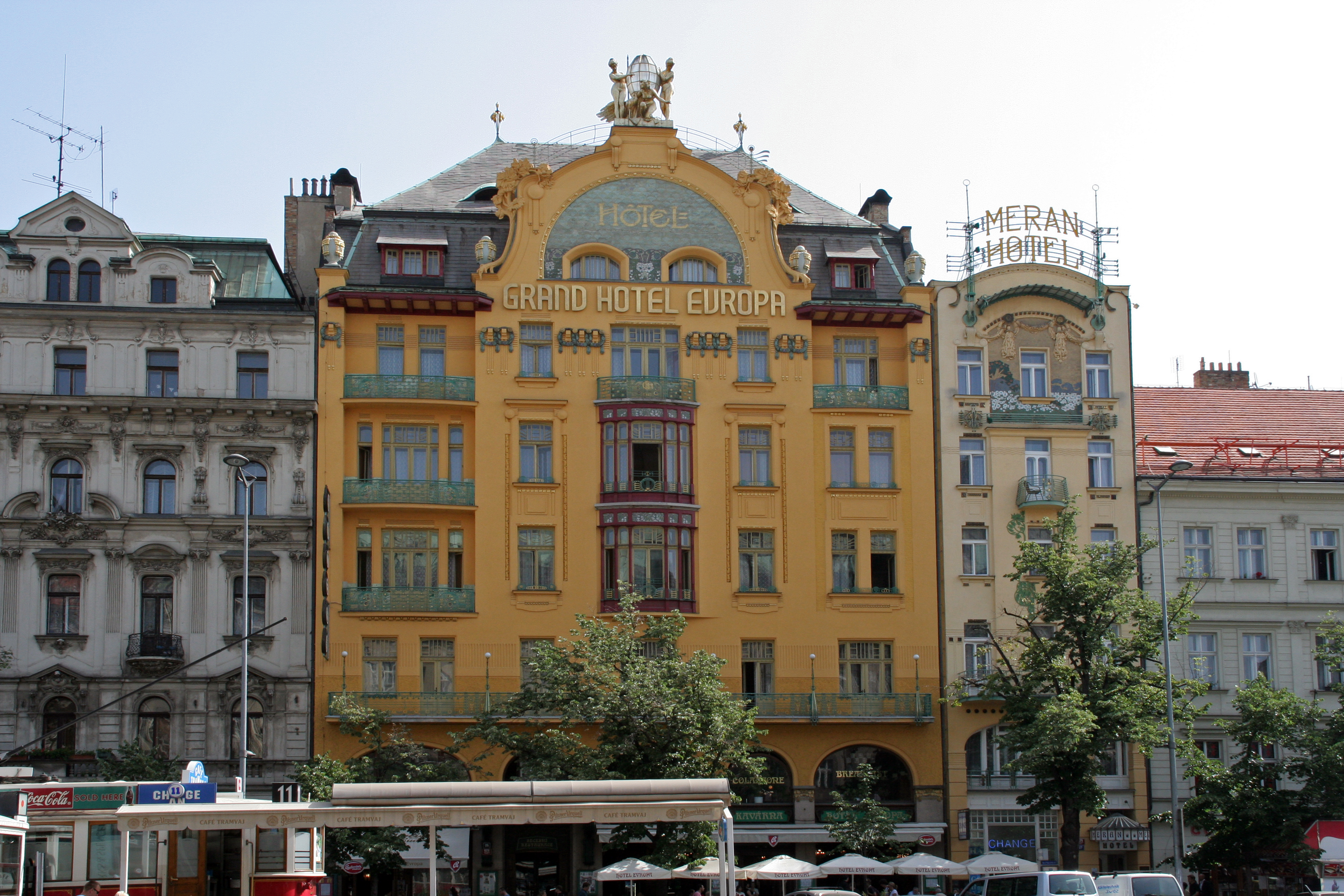 Grand Hotel Europa 1